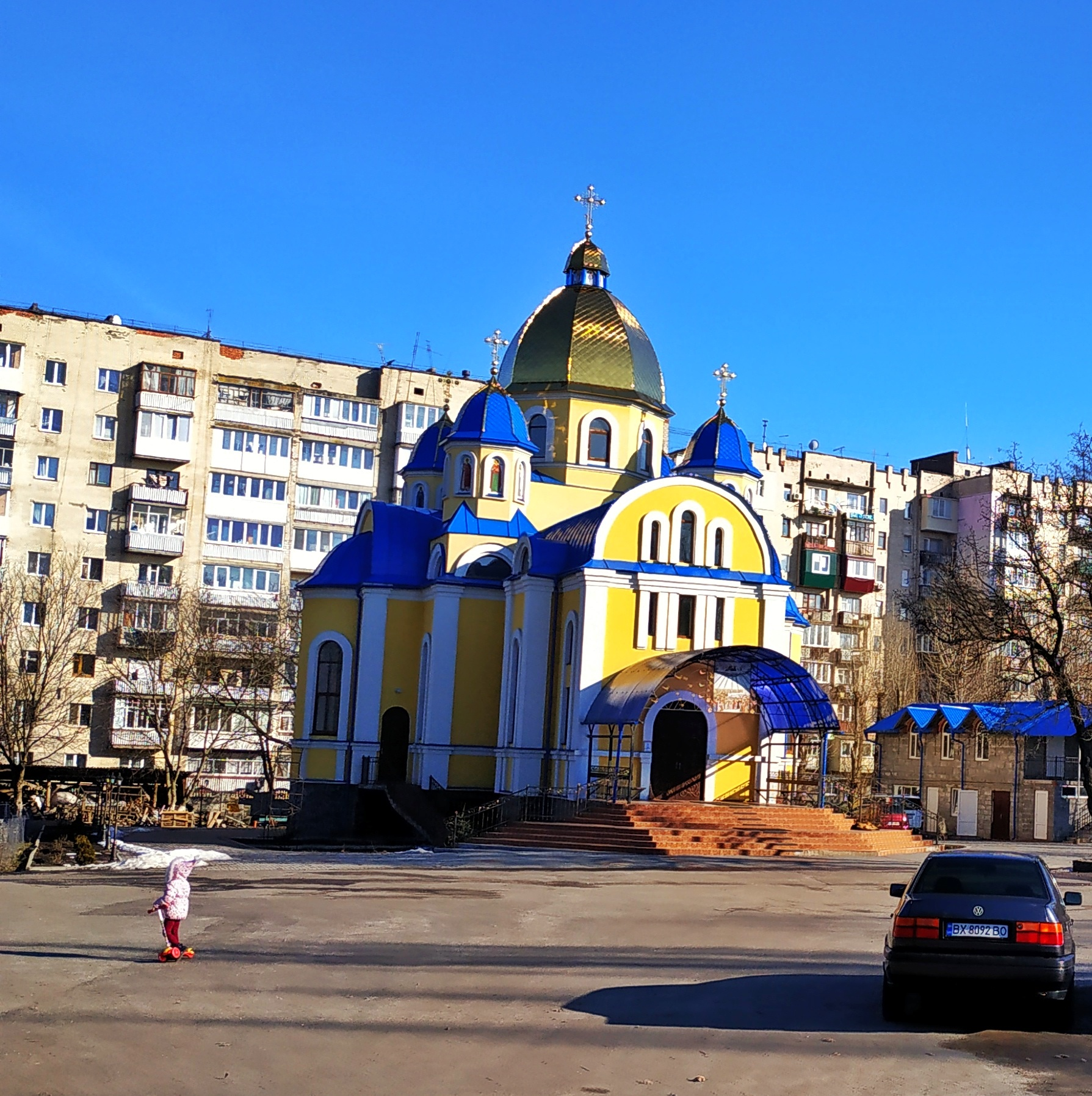 Templo de Ĉiuj Sanktuloj de la Ukraina Ortodoksa Eklezio de Ukrainujo ĉe la vojkruciĝo de la stratoj de Molodizhnaya kaj Ternopil